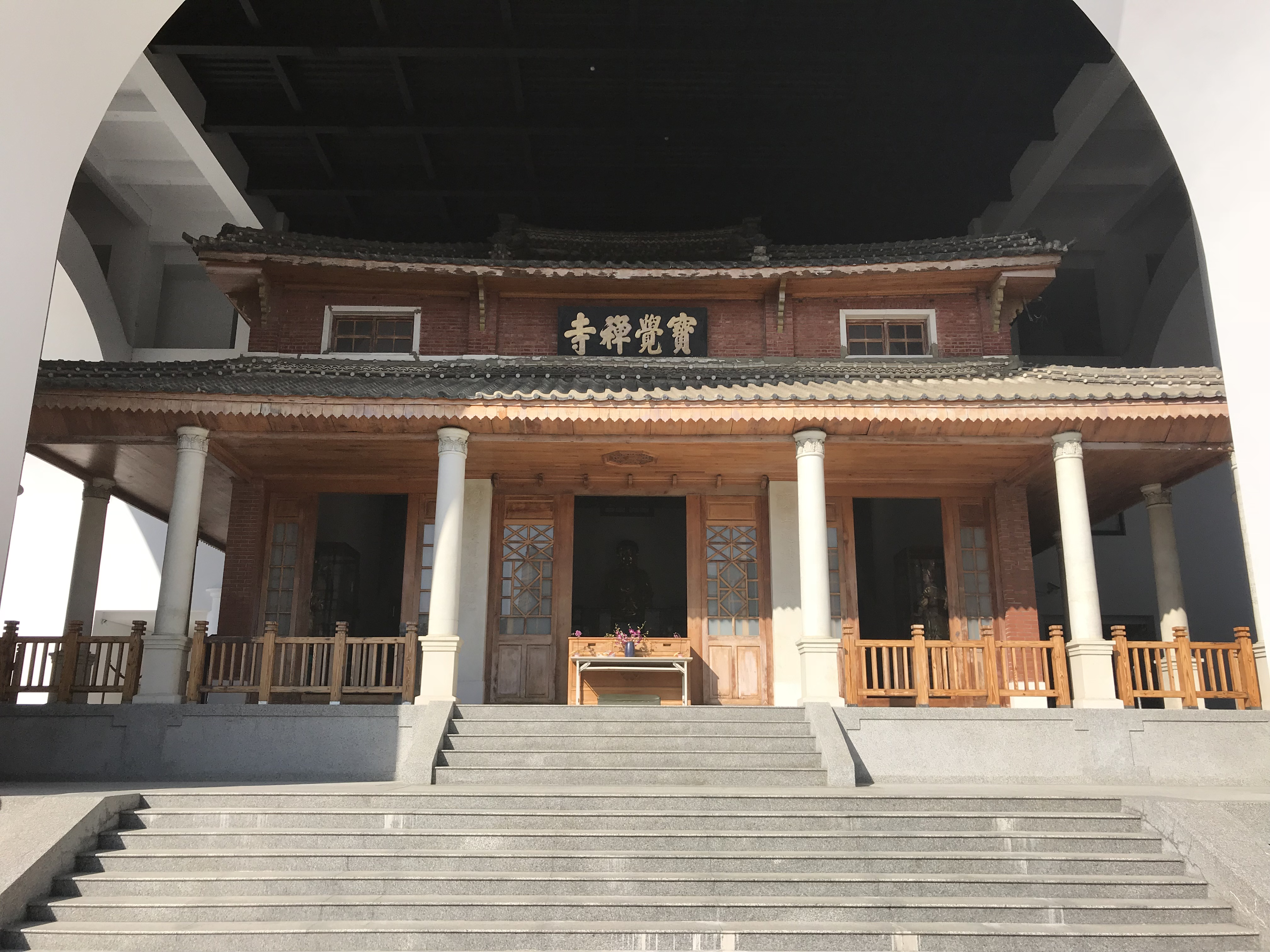 中文（台灣）: 寶覺禪寺舊殿